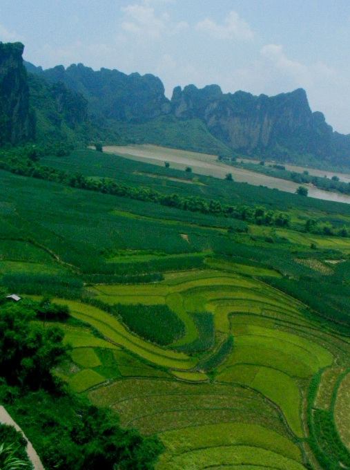 拍摄于崇左－龙州二级路，远处是左江 - mujianxiuxi